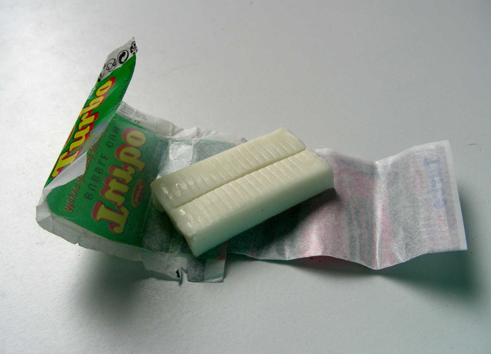 Guma Turbo po rozpakowaniu